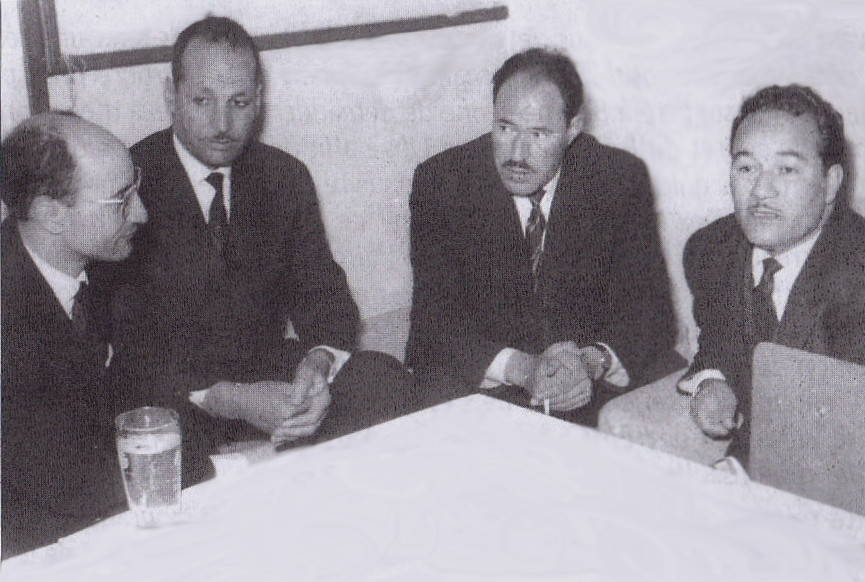 Au congres de Tripoli 1962 Si Sliman Gaid Ahmed ,Cdt Mostéfa Merarda - Cl El Hadj Lakhdar